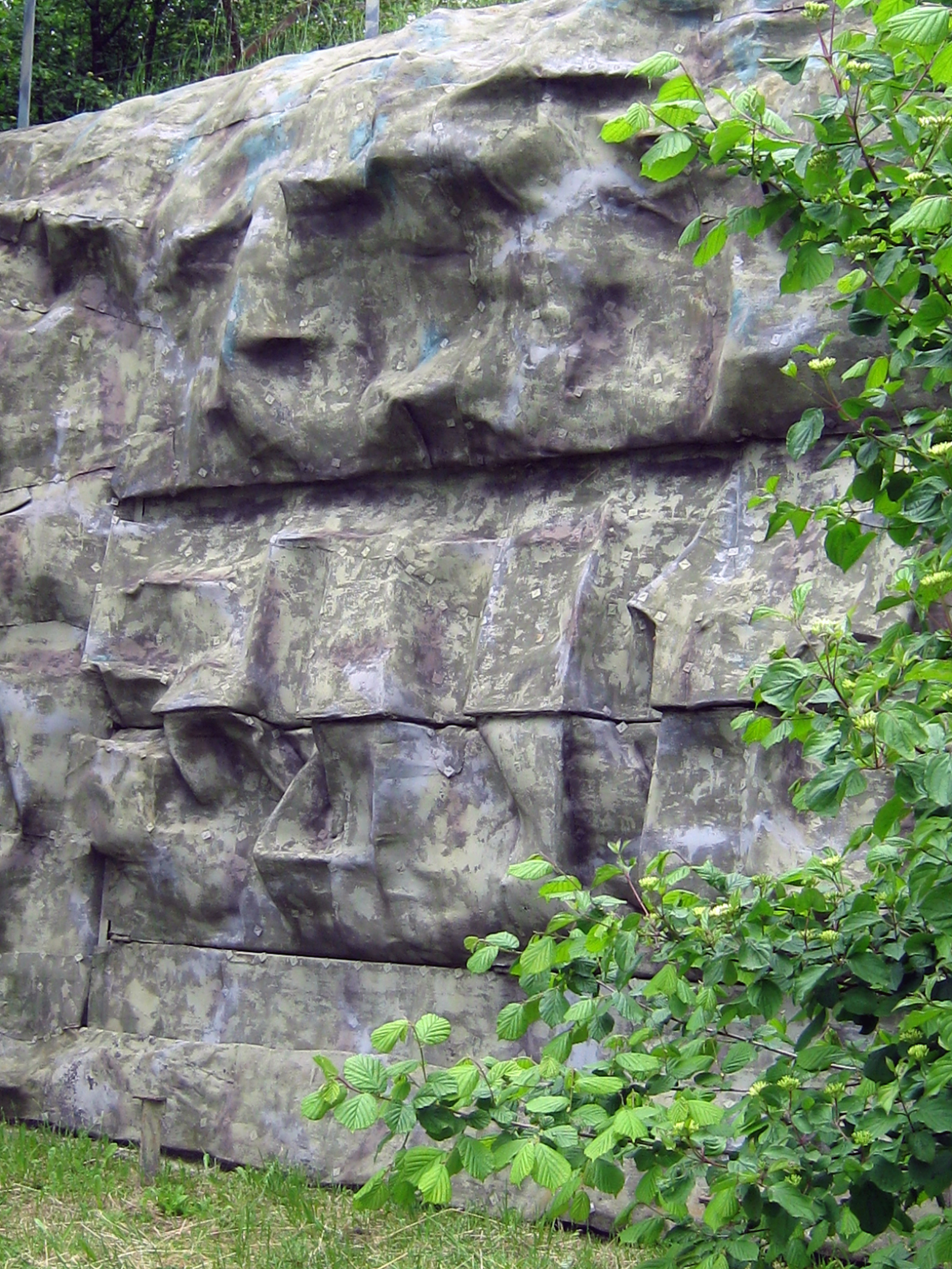 Aussenansicht Geschütz 1 im Festungsmuseum Reuenthal